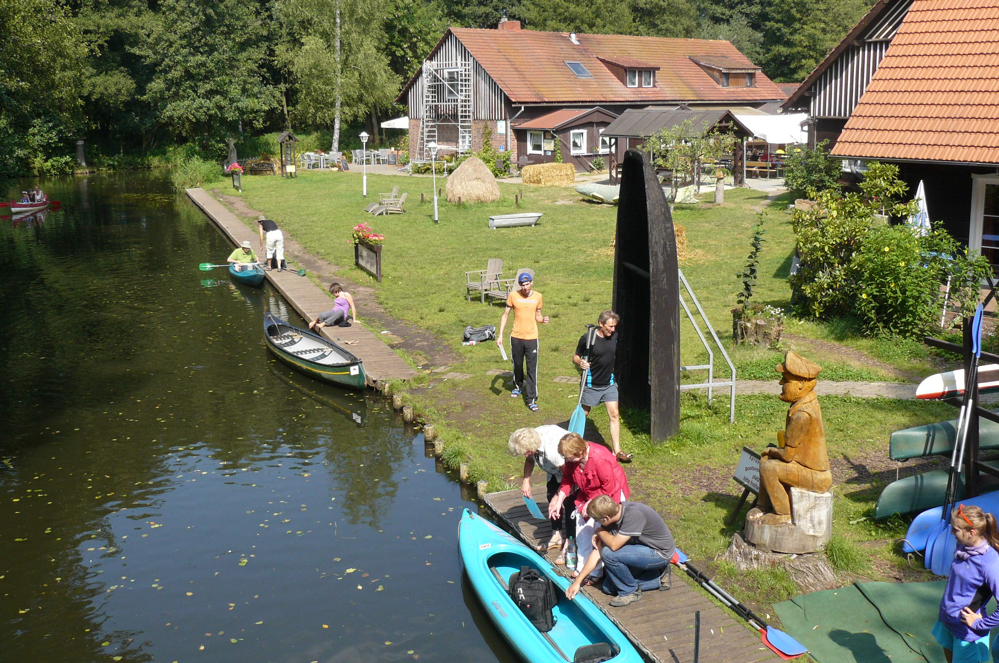 Leipe, Spreewald.